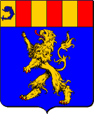 "D'azur au lion d'or, au chef palé d'or et de gueules à six pièces, le premier pal chargé d'un dauphin d'azur."